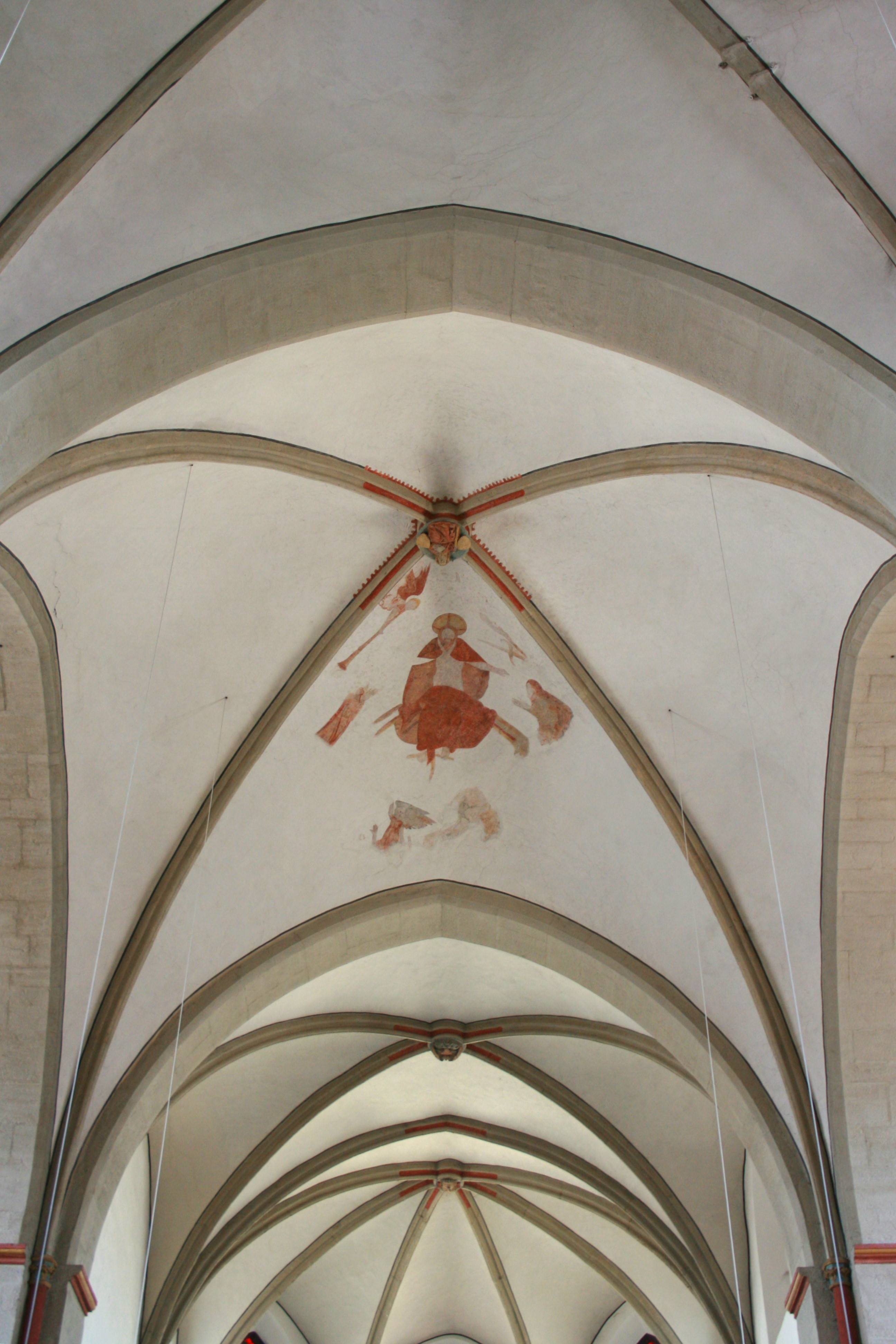 Evangelische Jakobus-Kirche an der Denkmalstraße in Breckerfeld